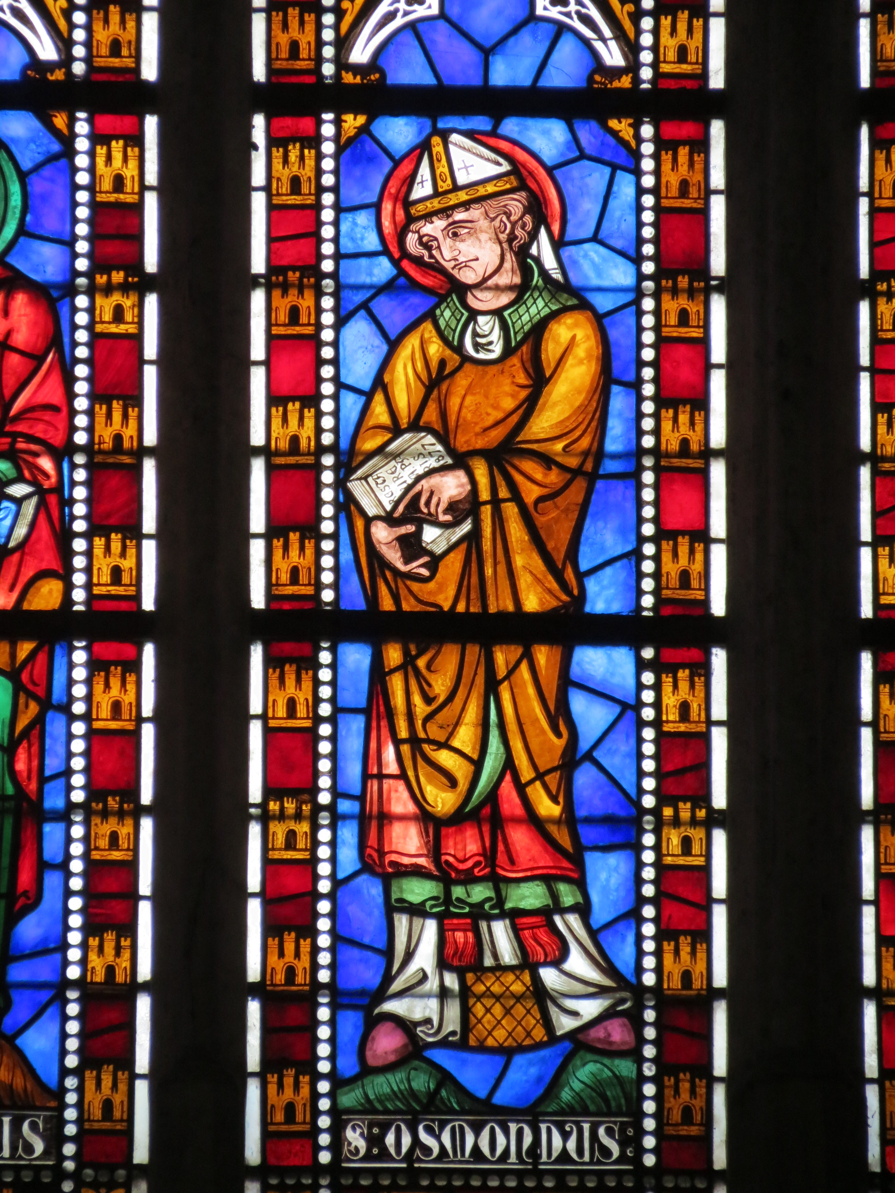 Vitrail de la rose nord représentant Saint Osmond, évêque de Salisbury (1078-1099).